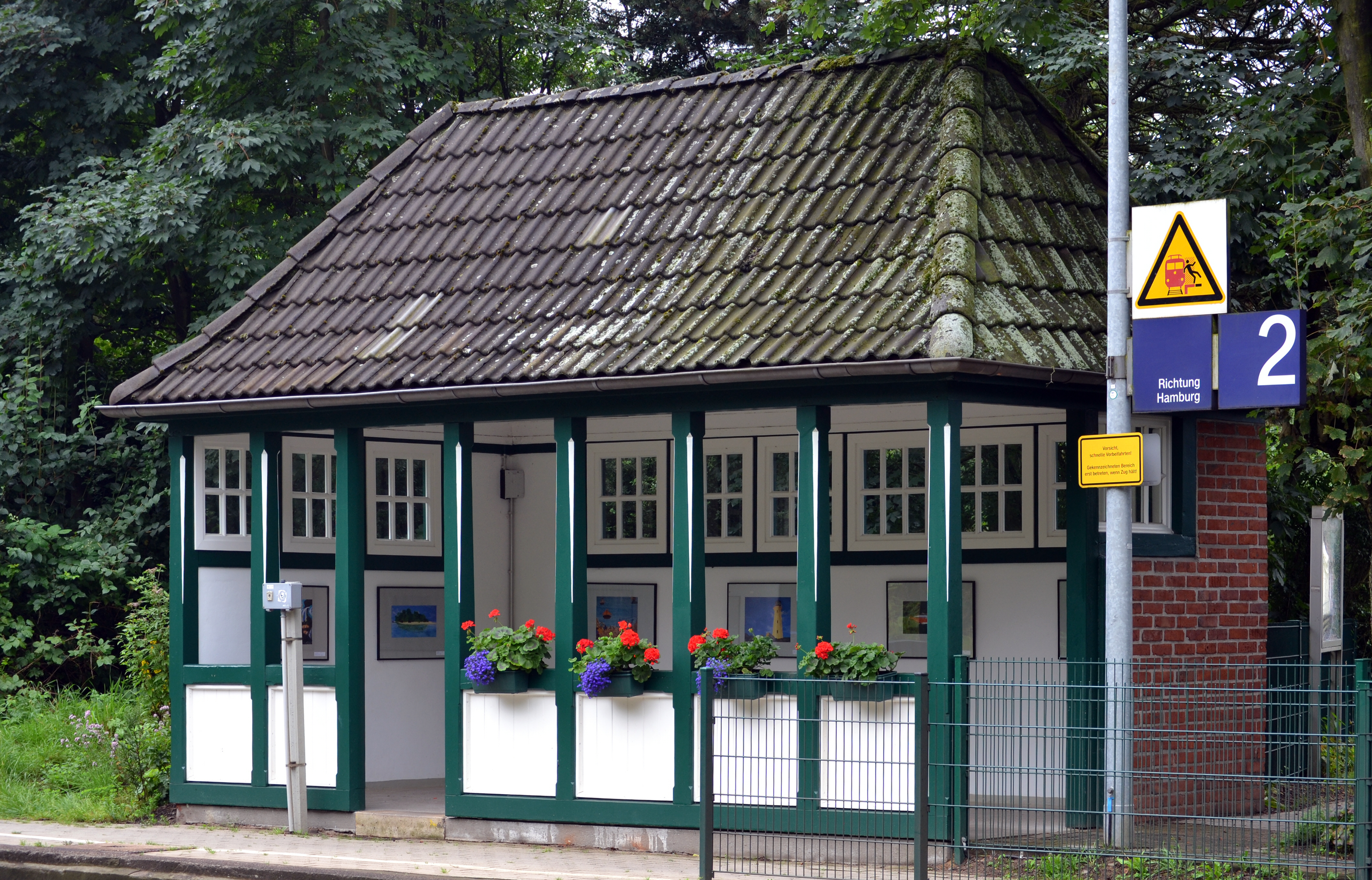 Das historische Wartehäuschen von 1911 am Prisdorfer Bahnhof